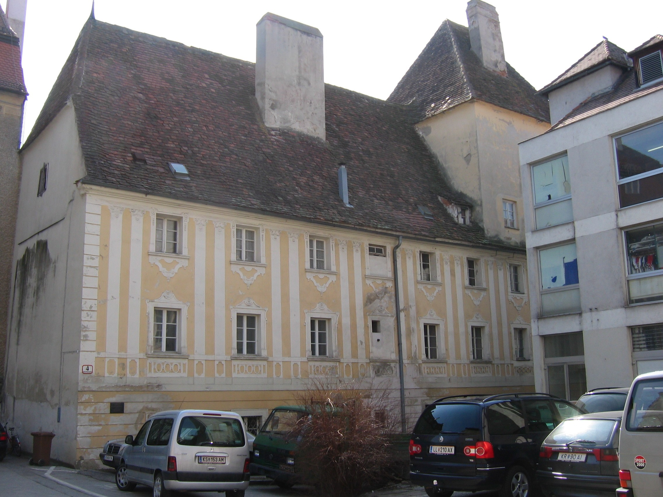 Haus Gewerbehausgasse 4 Teil des Herzoghofs vor Renovierung